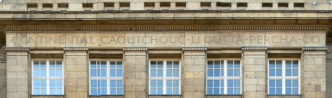 Alter Firmenname der Continental AG am früheren Verwaltungsgebäude an der Vahrenwalder Straße in Hannover.